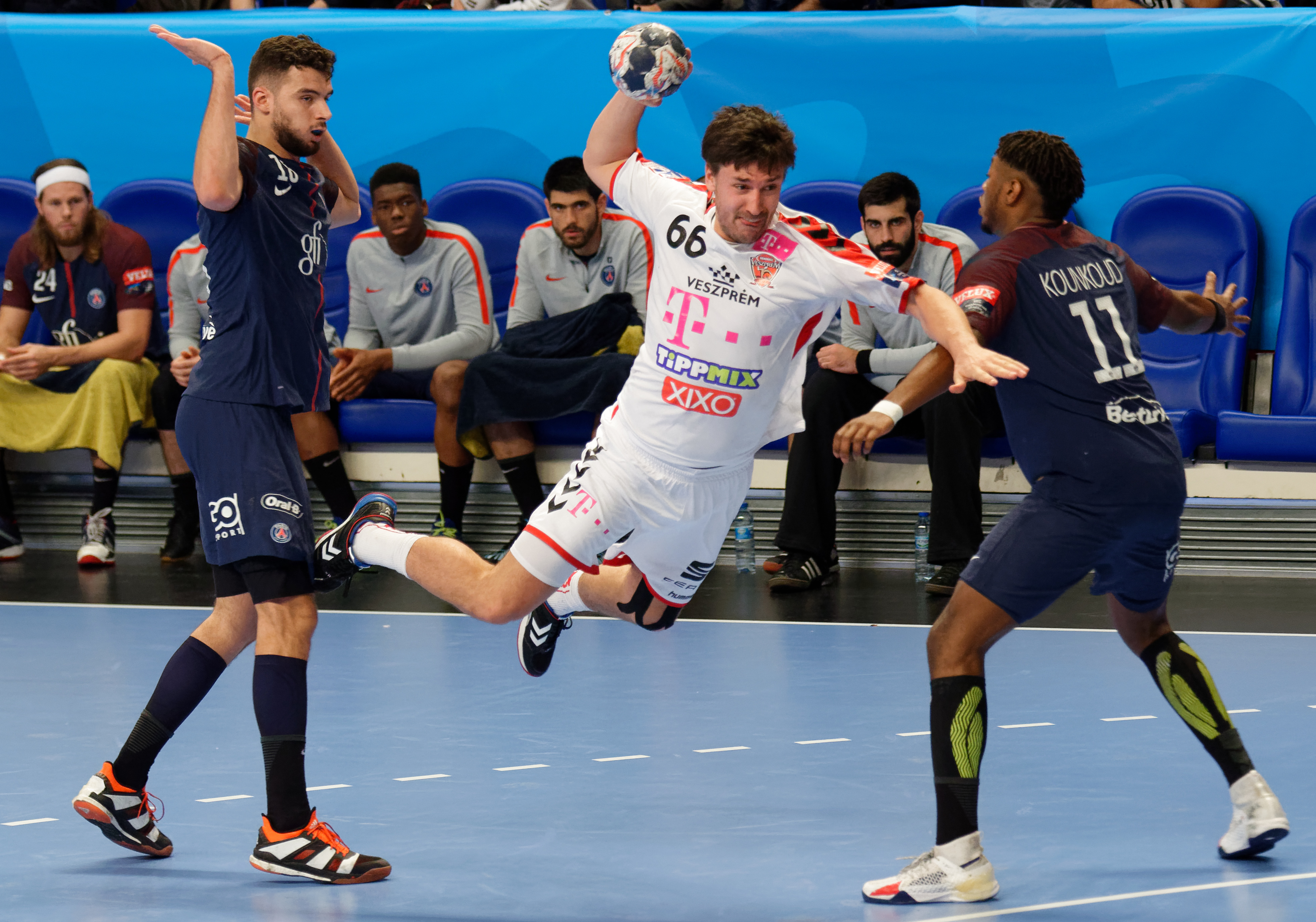 Rencontre de phase de groupe de la ligue des champions 2017/18 entre le PSG et Veszprem. A Coubertin, le 12 novembre 2017.